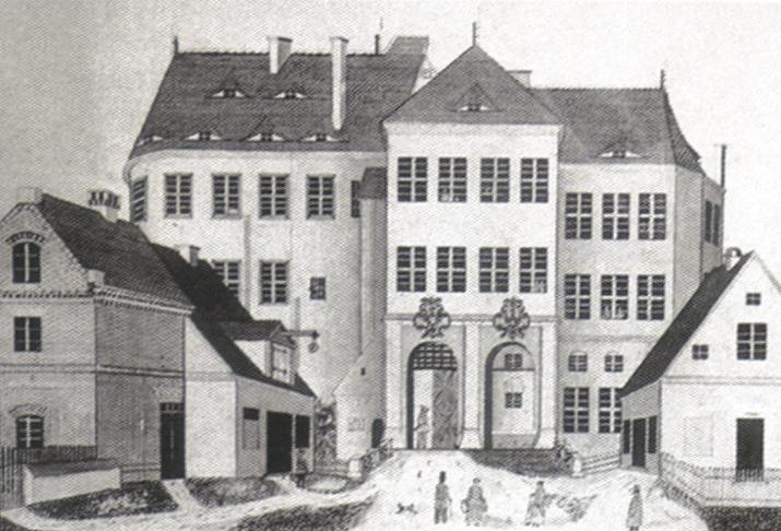 Schloss Hoyerswerda (Ende 19. Jahrhundert)